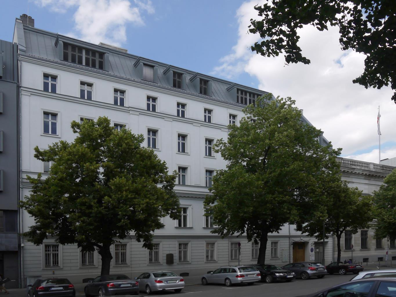 Gebäude in der Jägerstraße 51 in Berlin-Mitte